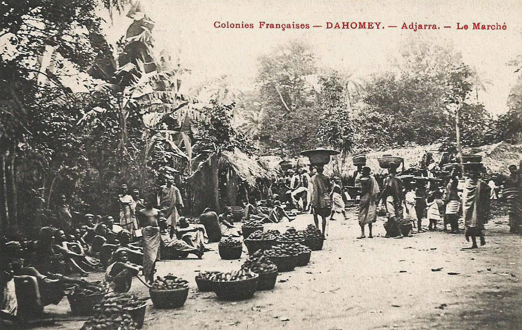 Dahomey. Adjarra. Le marché. Colonies françaises. Dahomey